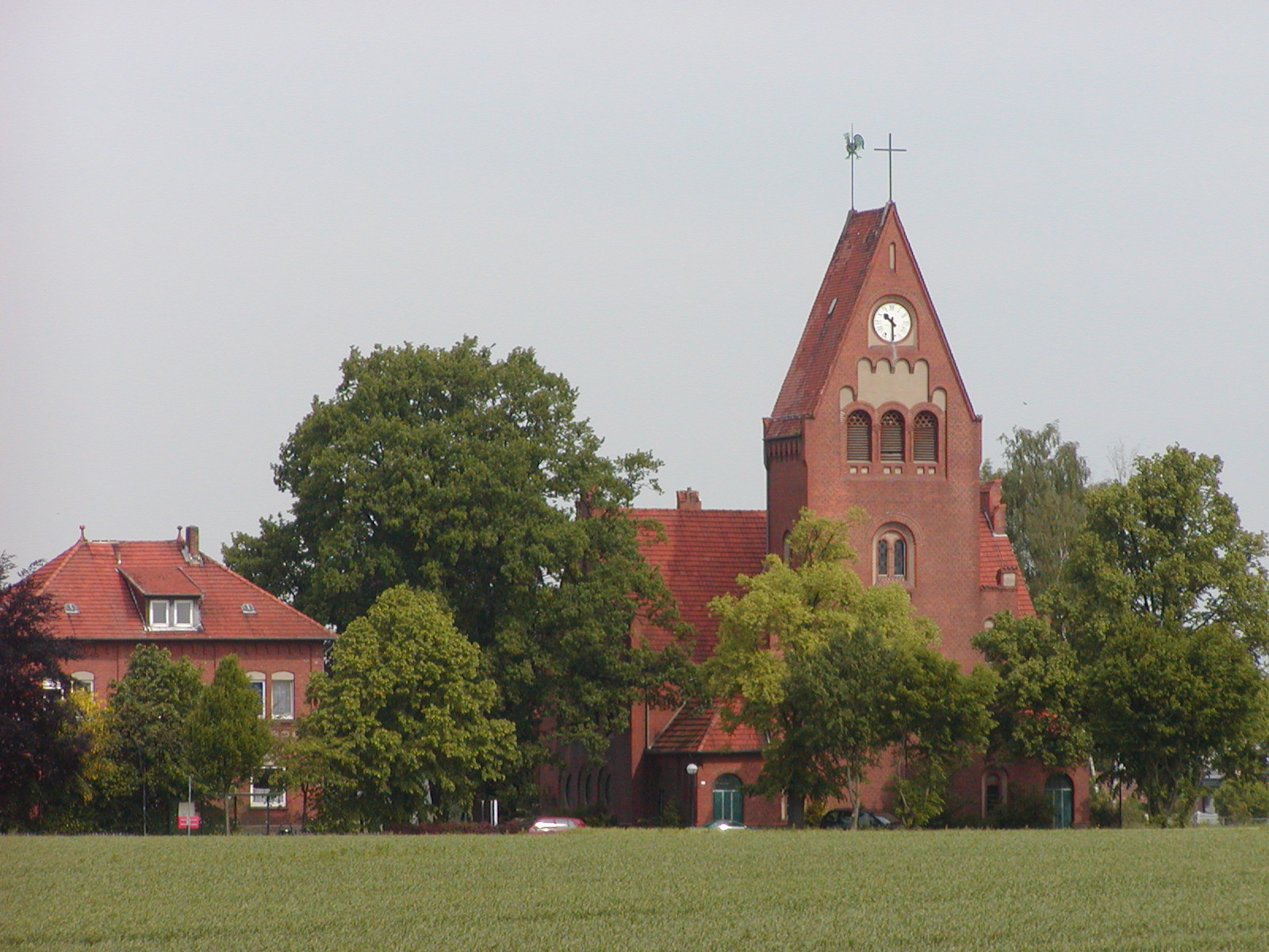 Südansicht der Christuskirche bei Minden-Todtenhausen, Nordrhein-Westfalen.